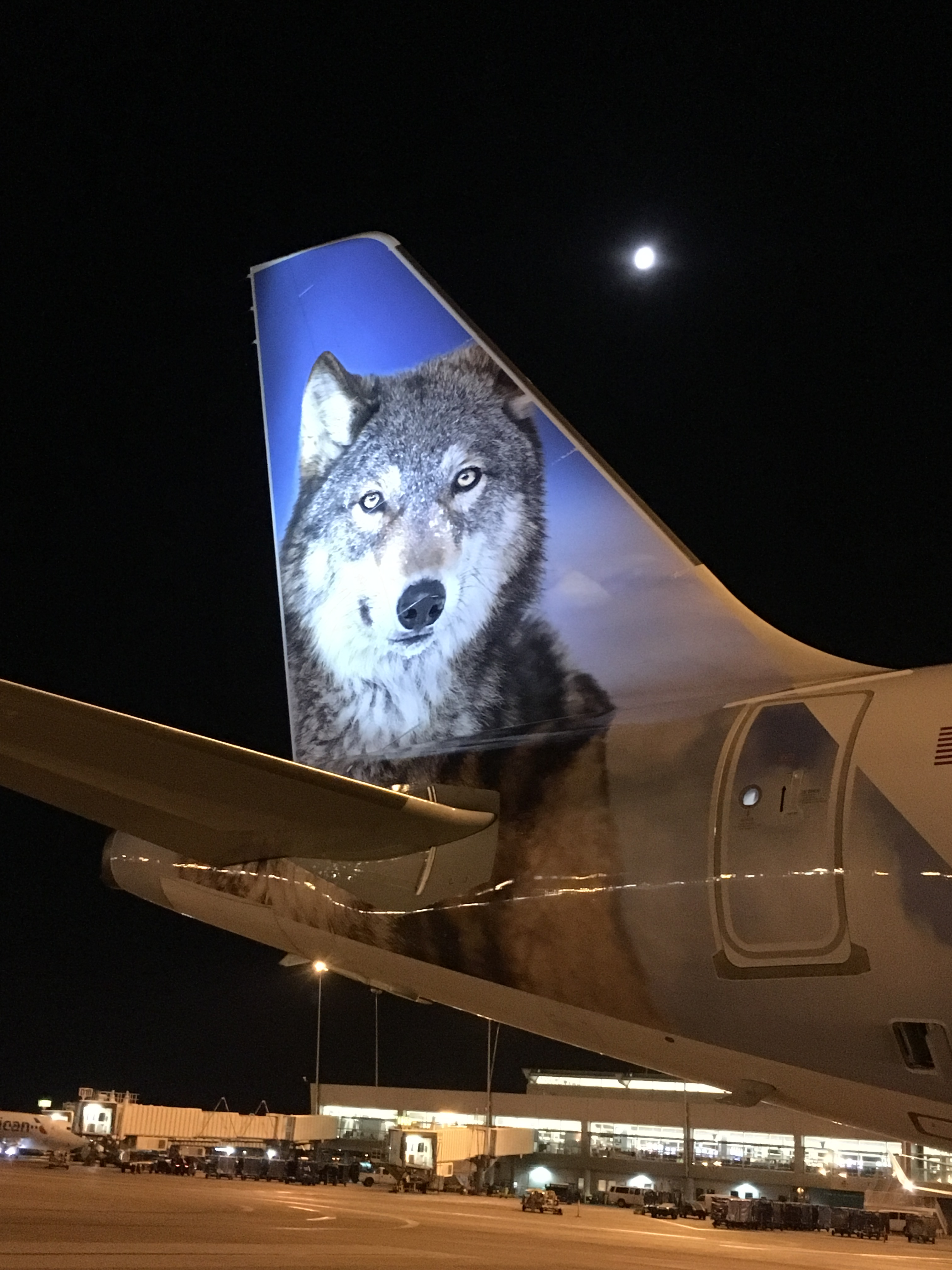 Frontier Airline A321